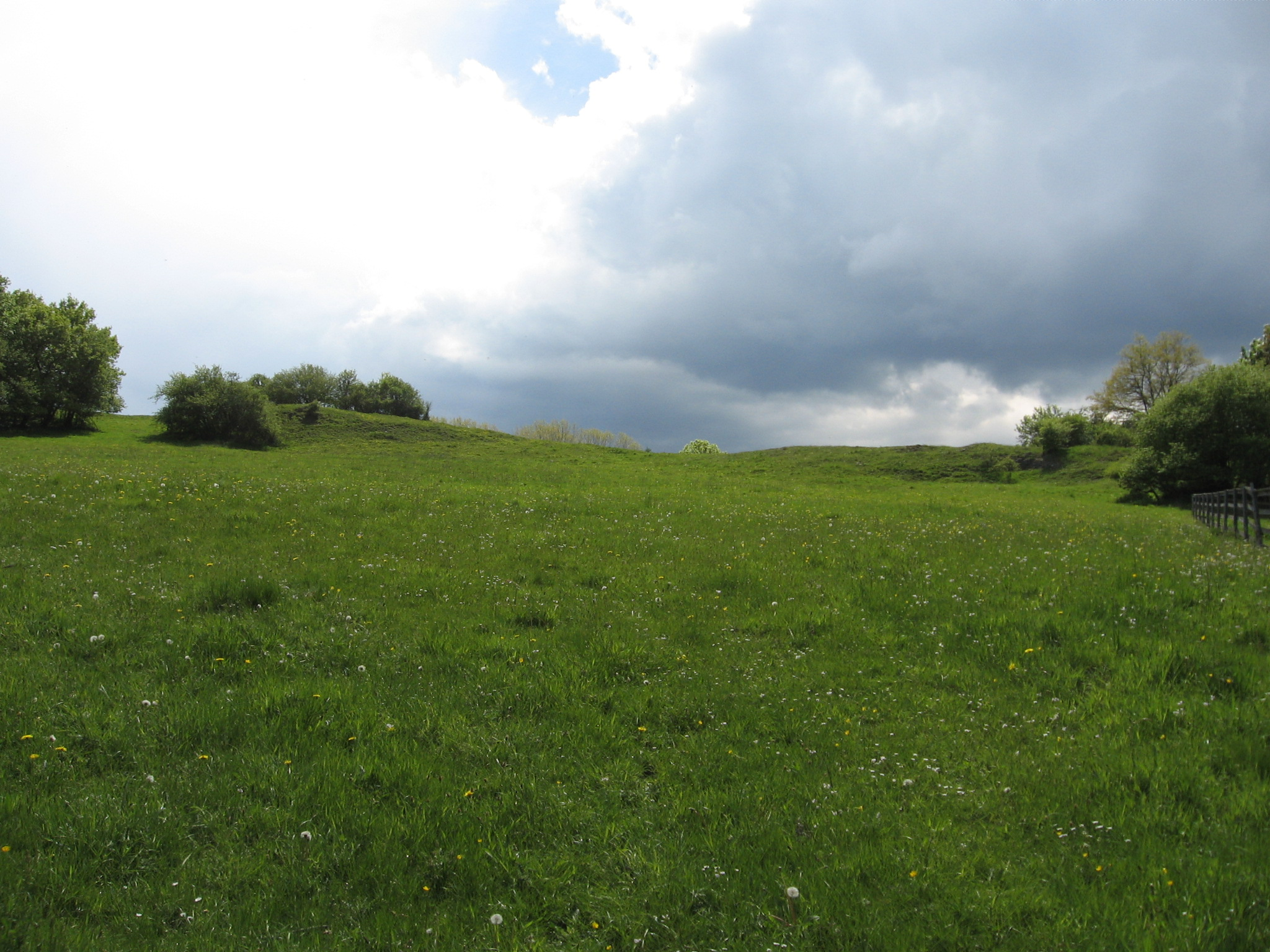 Westliche Bereiche vom Naturschutzgebiet Niedermühle mit Grünland. Im oberen Bereich befinden sich Magerrasen.